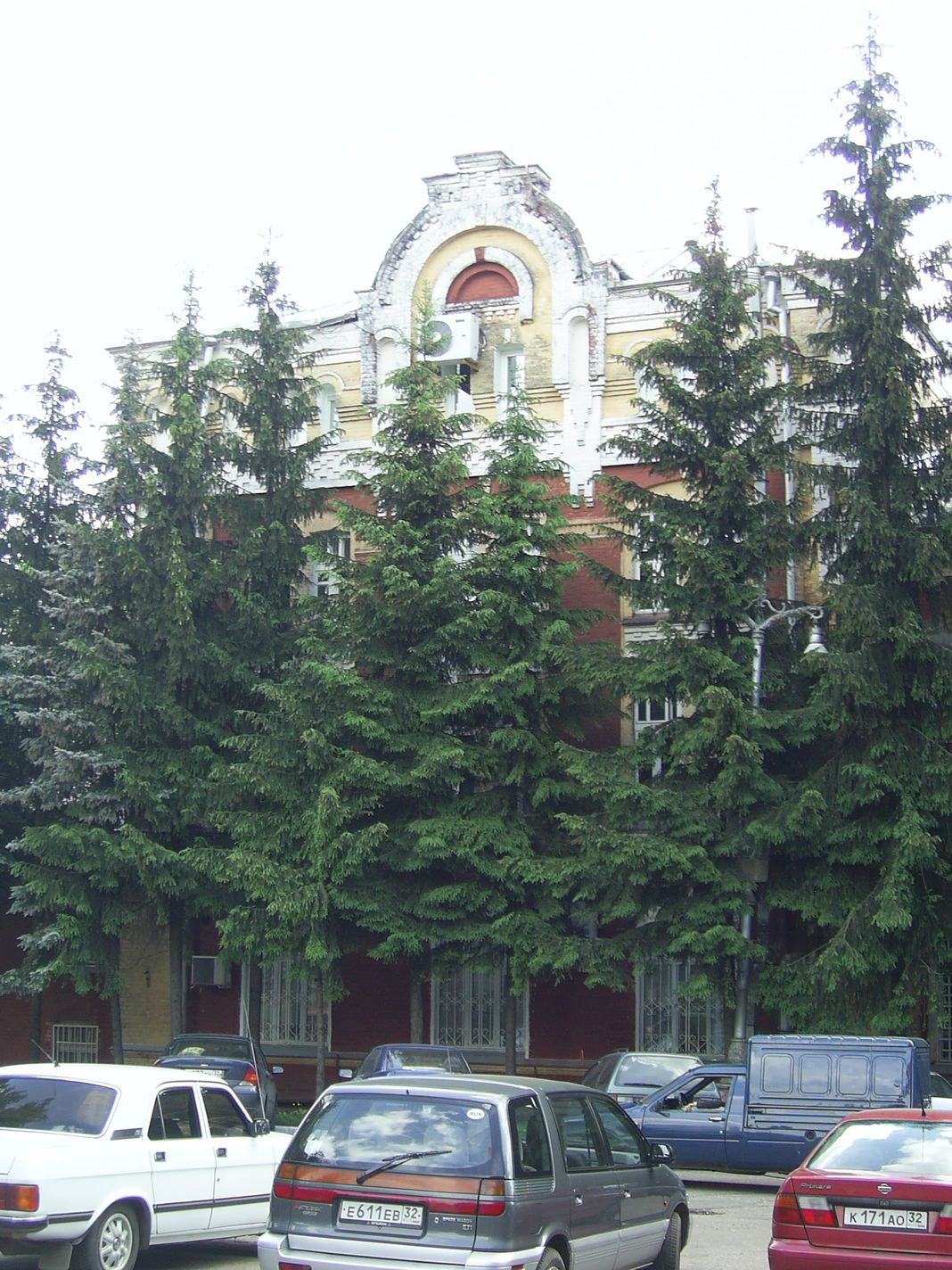 Брянск, площадь Карла Маркса (Красная пл.). Винный зАмок